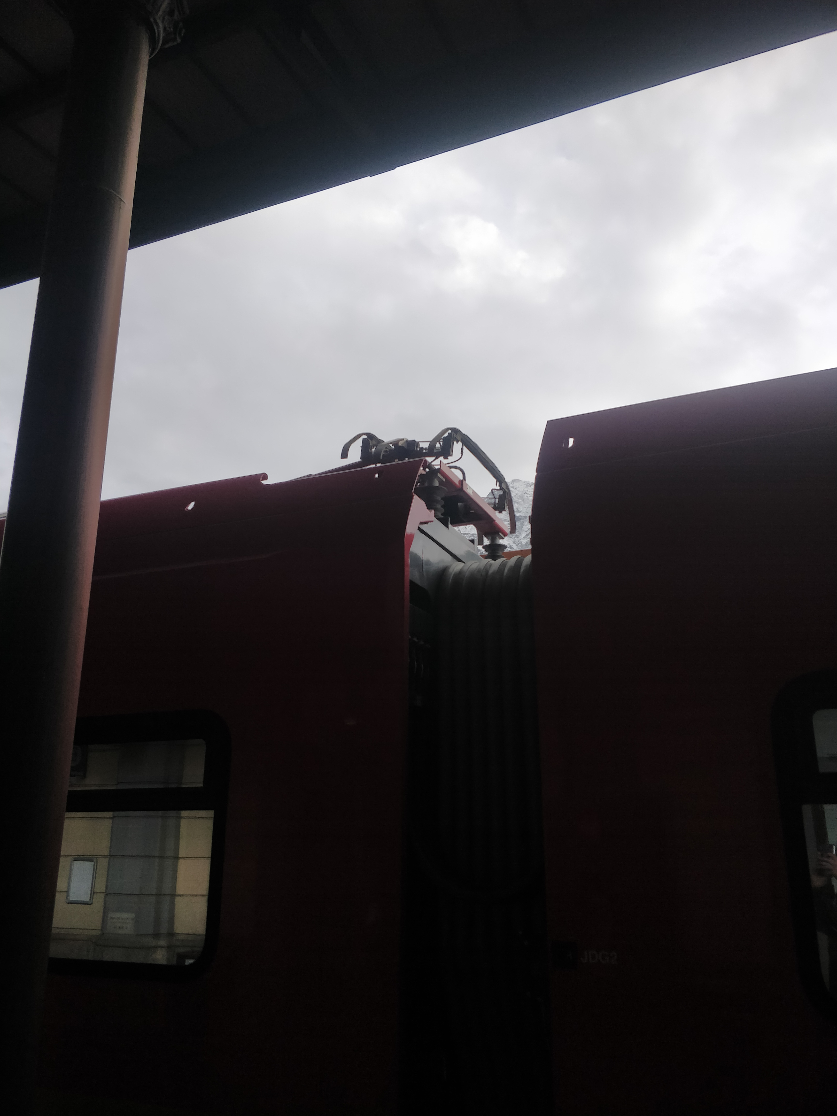 Pantografo BTR 813